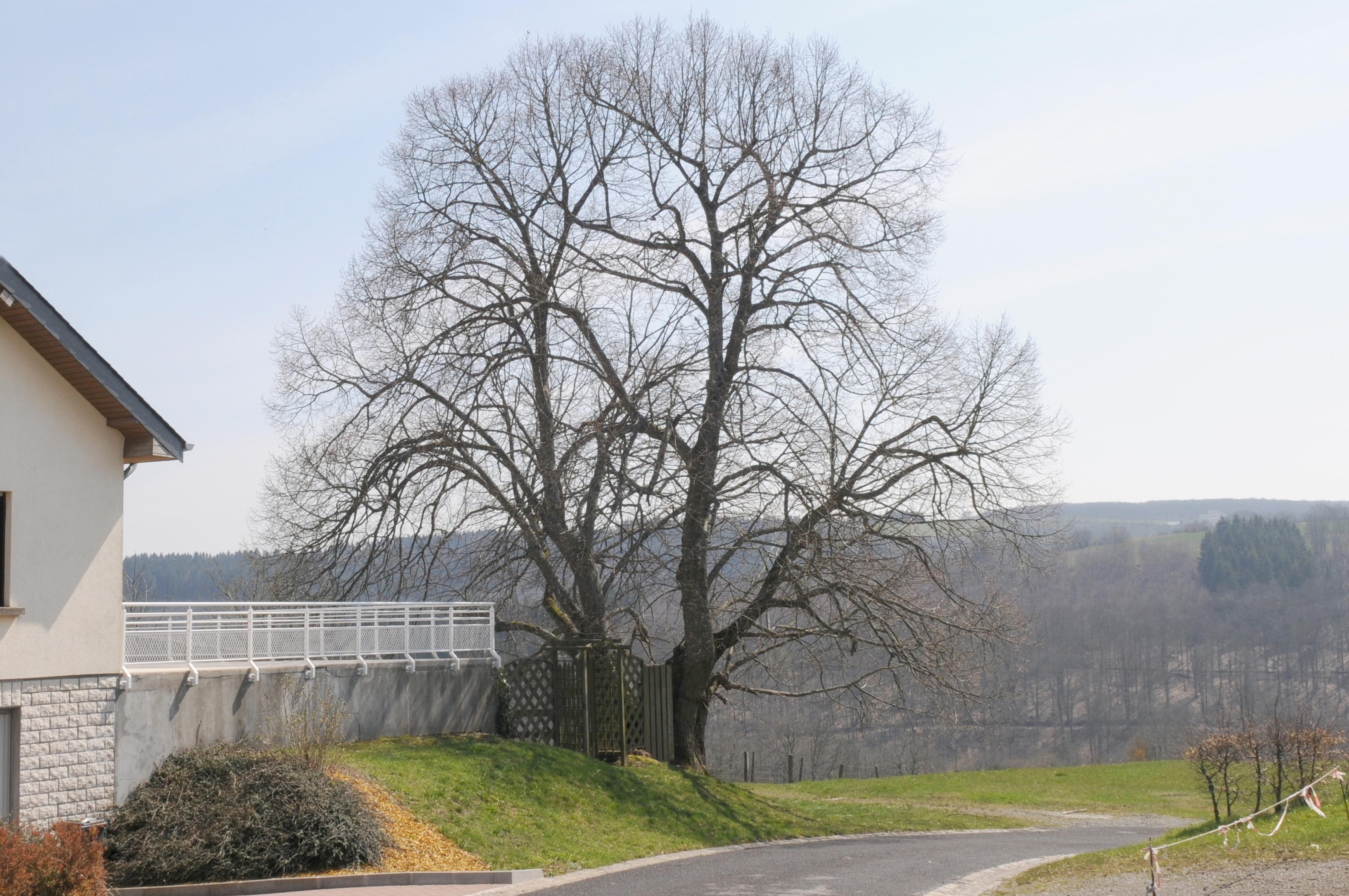 Lann zu Pëtscht.